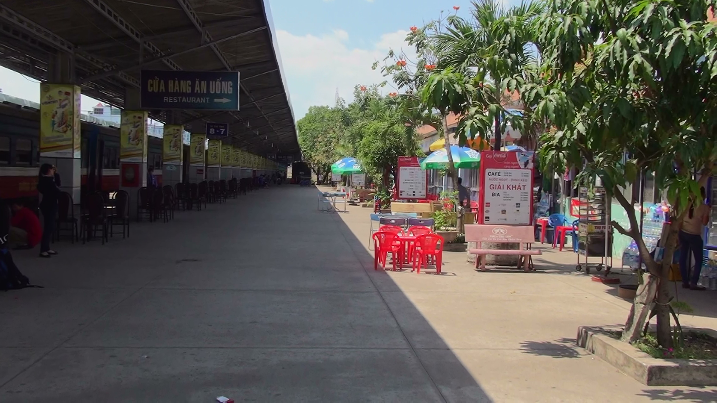 ベトナム南北統一鉄道サイゴン駅ホーム